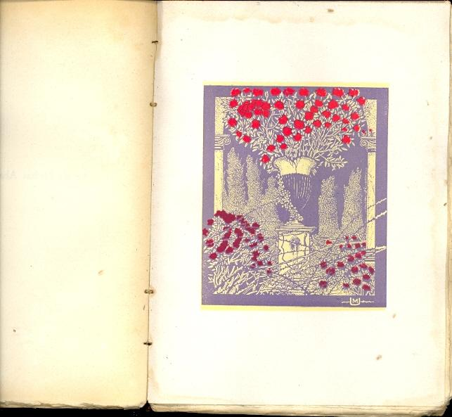 Dibuix de Miquel Utrillo per al llibre Oracions de Rusiñol. Música Enric Morera. Modernisme. Art Total.